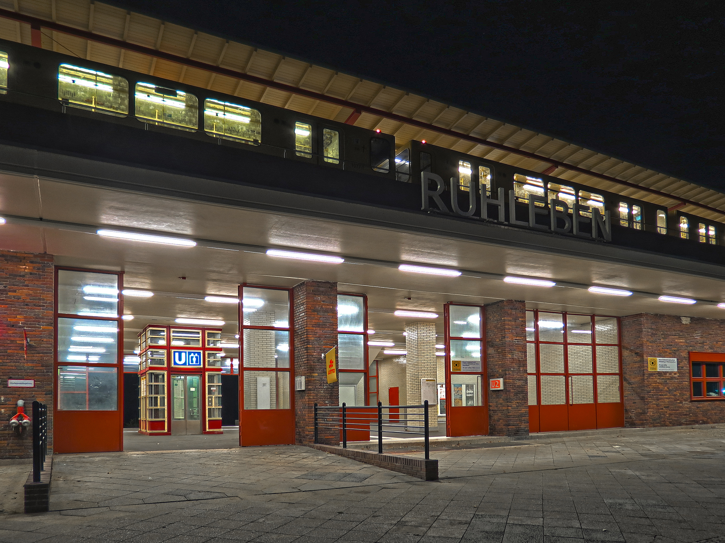 U-Bahnhof Ruhleben bei Nacht